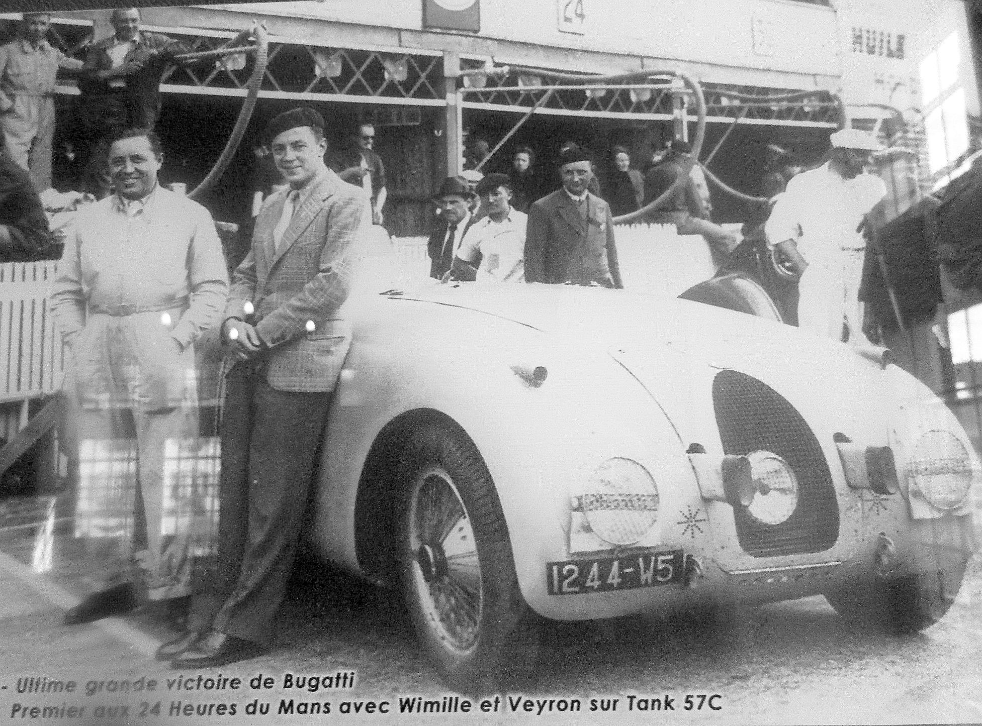 Bugatti Type 57 Tank 1939 : ultime victoire de Bugatti en compétition aux 24 Heures du Mans 1939 avec les pilotes Jean-Pierre Wimille et Pierre Veyron